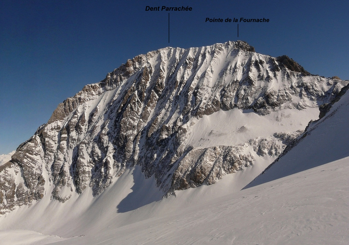 Il versante nord-ovest della Dent Parrachèe e della Pointe de la Fournache.